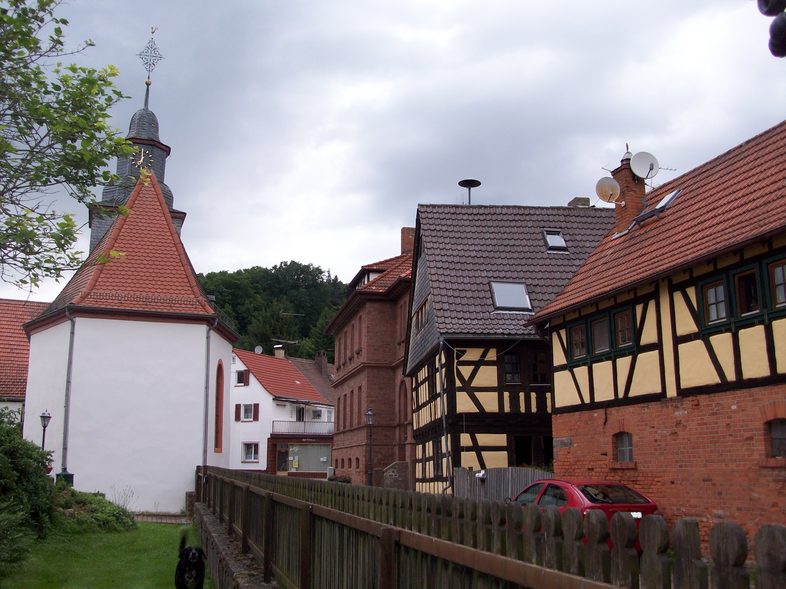 Blick vom Bakkes zur Ortskirche in Wald-Amorbach